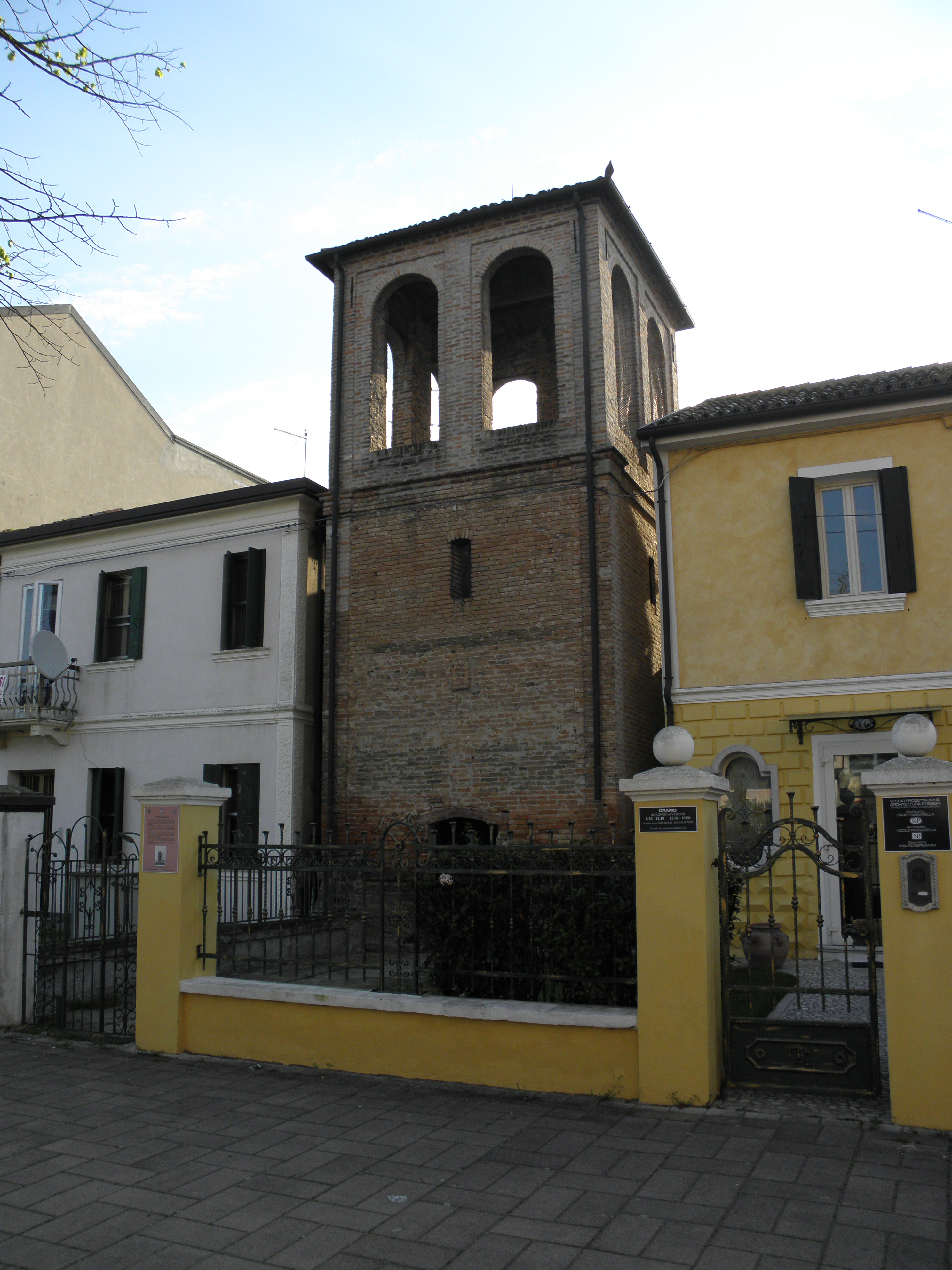 Taglio di Po, la vecchia torre campanaria risalente al 1882.